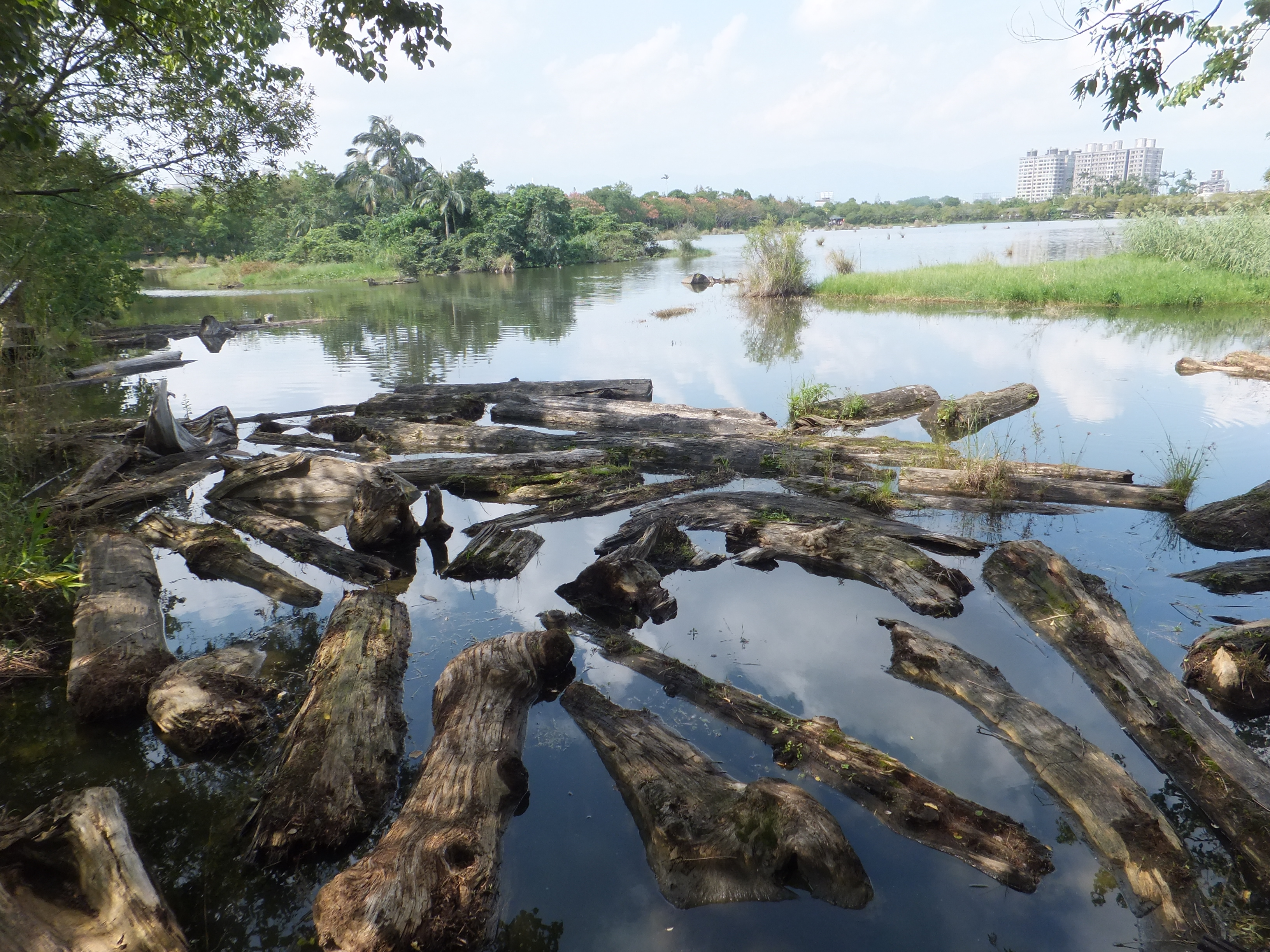 羅東林業文化園區的松羅埤